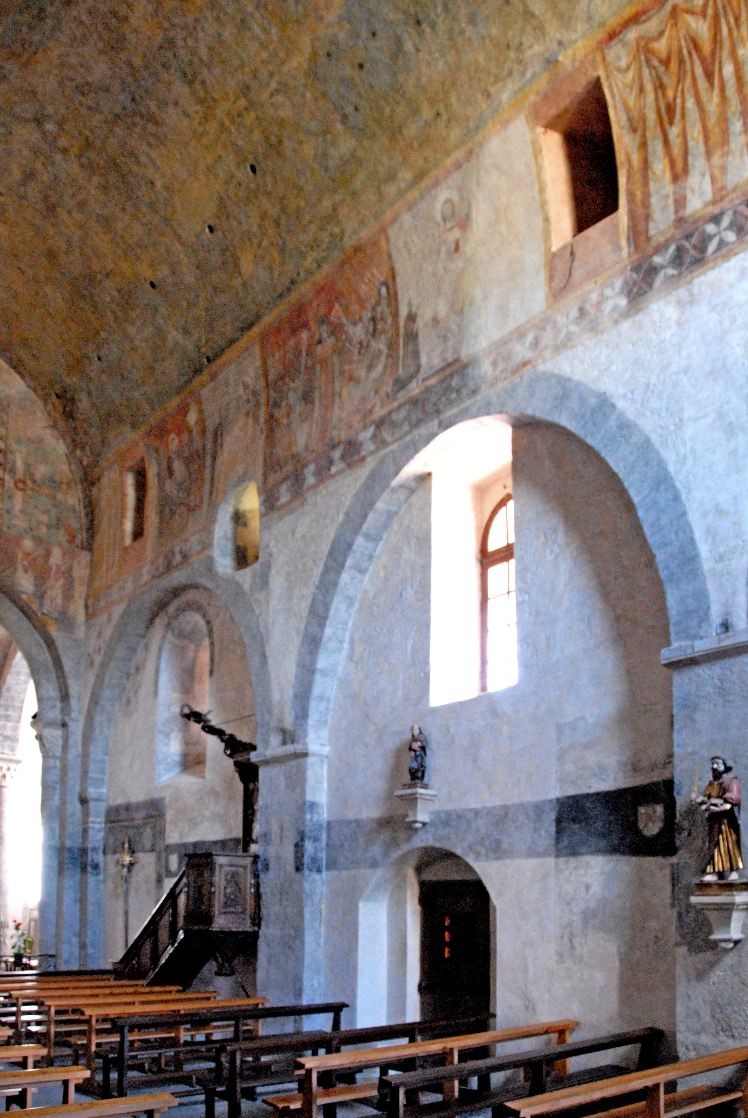 Abteikirche St.-André Lavaudieu, Hauptschiff, Südwand Joche 2 u. 3